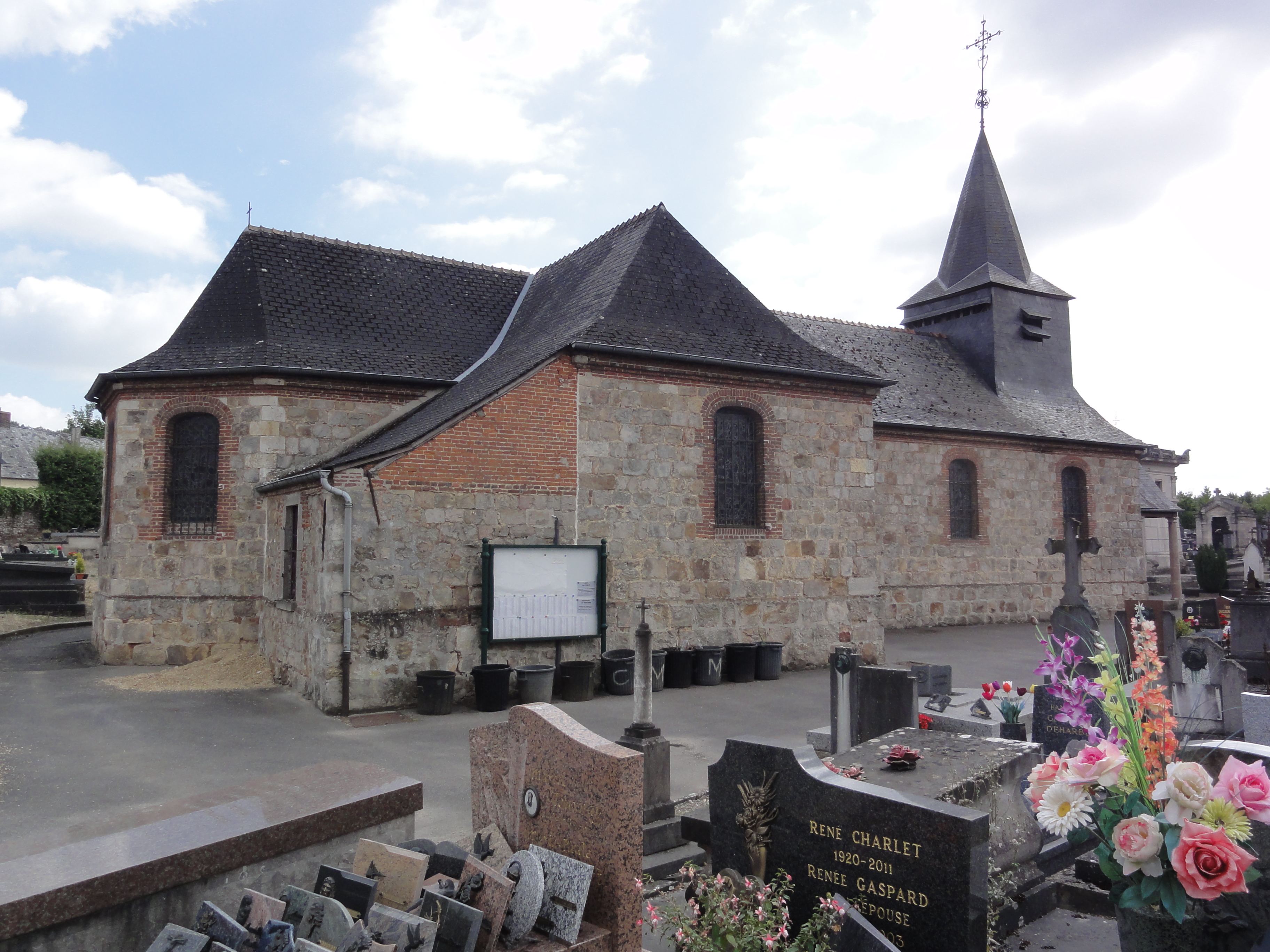 Vervins (Aisne) chapelle Ste. Thérèse, latéral